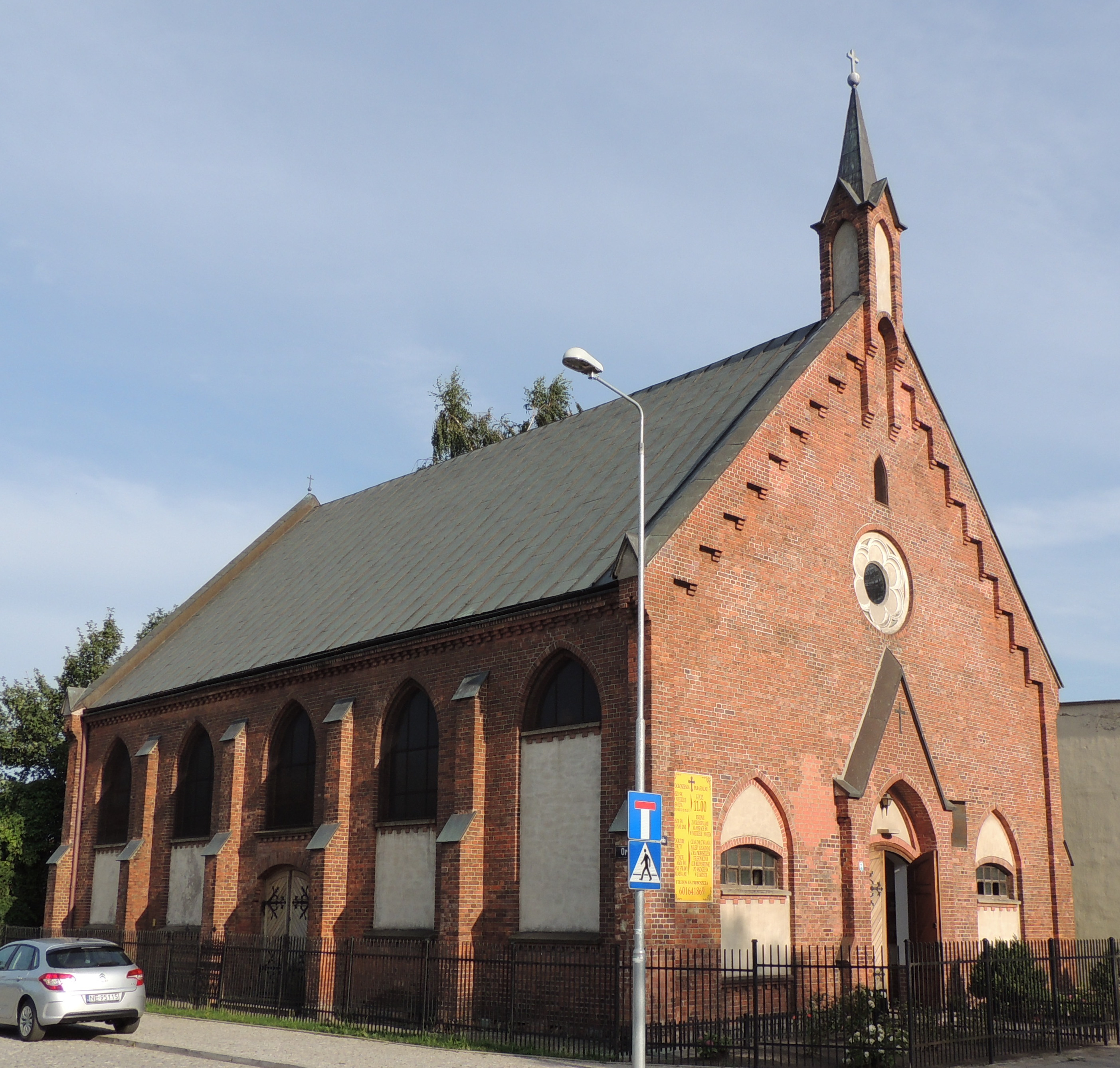 Elbląg, ul. Warszawska 9 - dawny kościół mennonicki, obecnie polsko-katolicki p.w. Dobrego Pasterza, 1880-1890